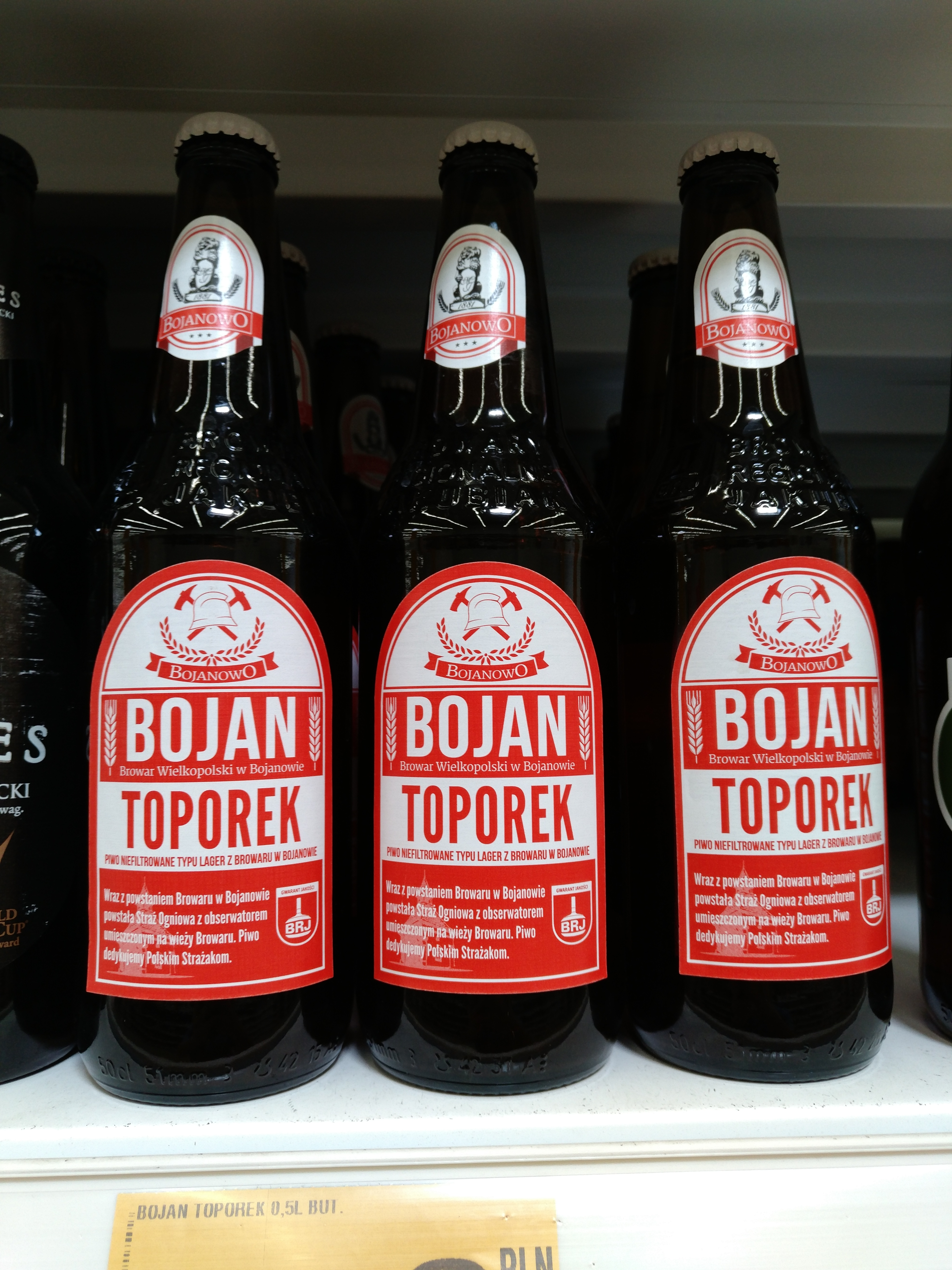 Polisy beer, Bojan Toporek